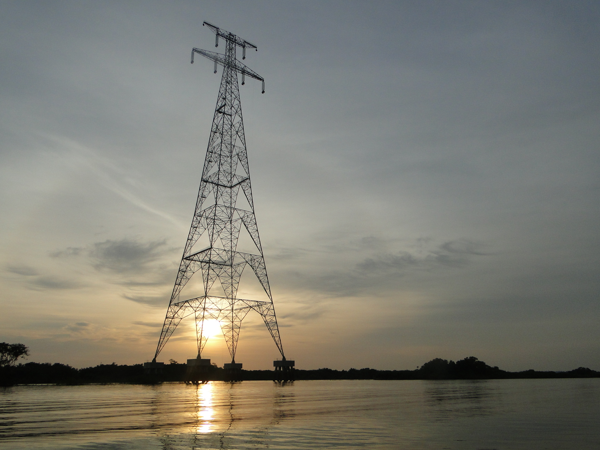 Foto: Novembro de 2012 (Divulgação/Ascom MPOG)